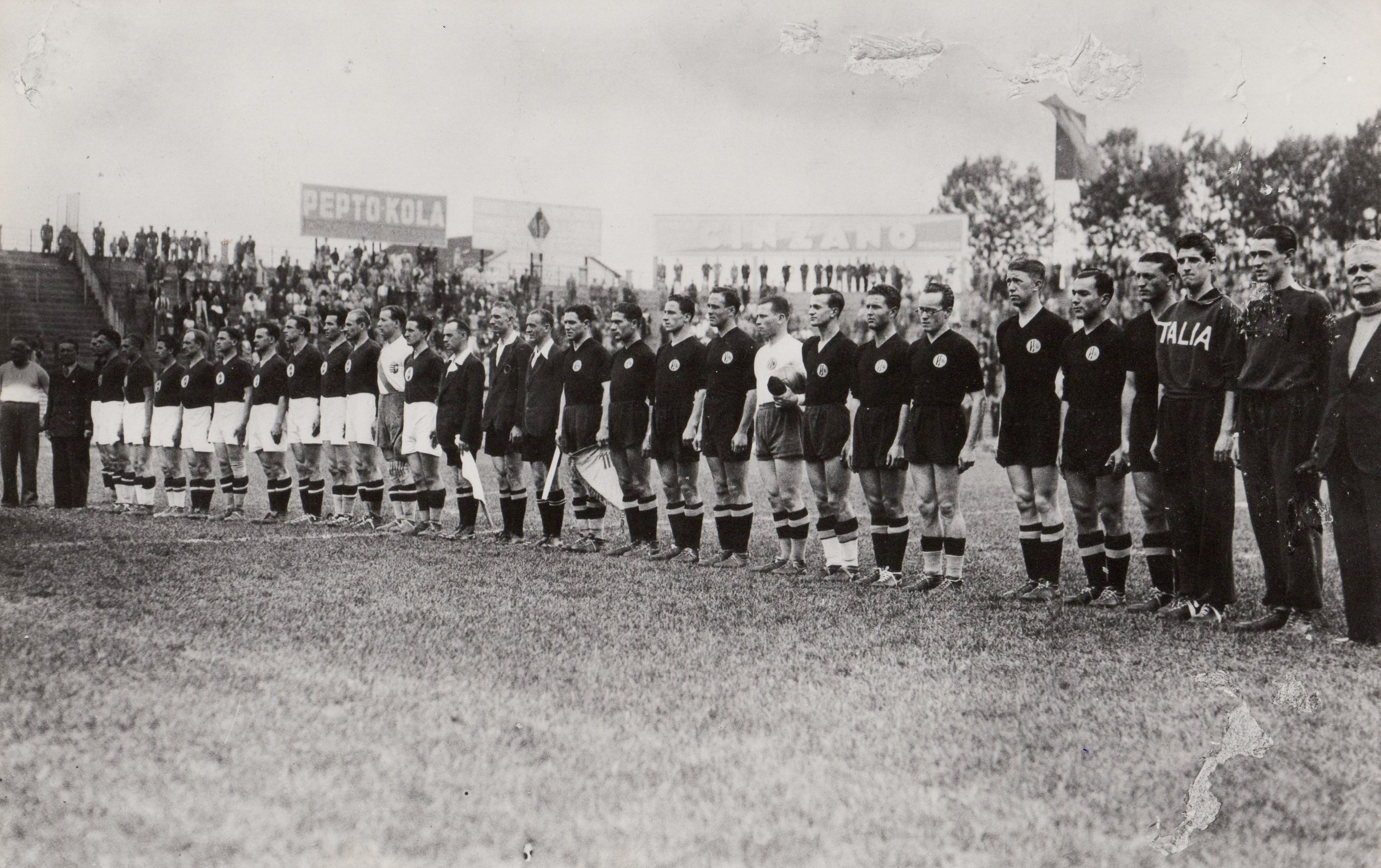 Italia-Ungheria 4-6-40